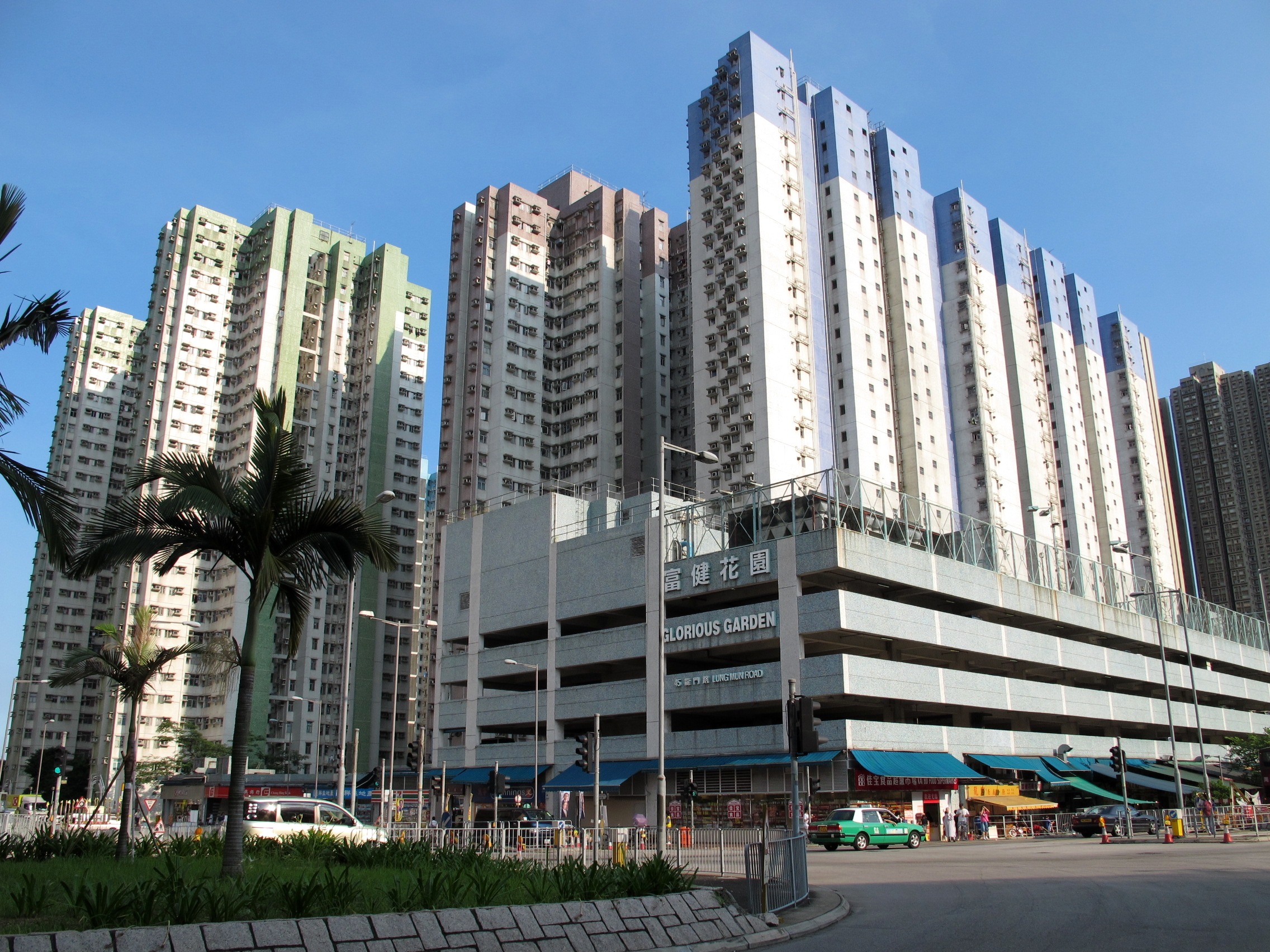 Glorious Garden in Tuen Mun 富健花園